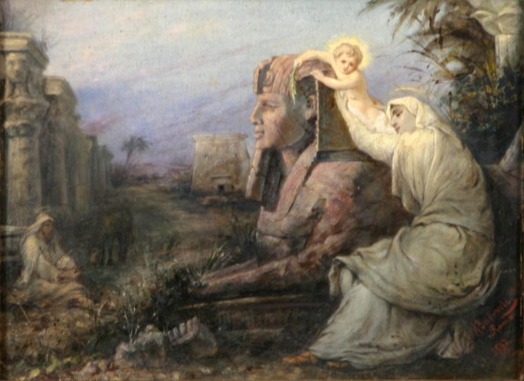 Adam Badowski (1857 - 1903). "Ucieczka do Egiptu", 1882